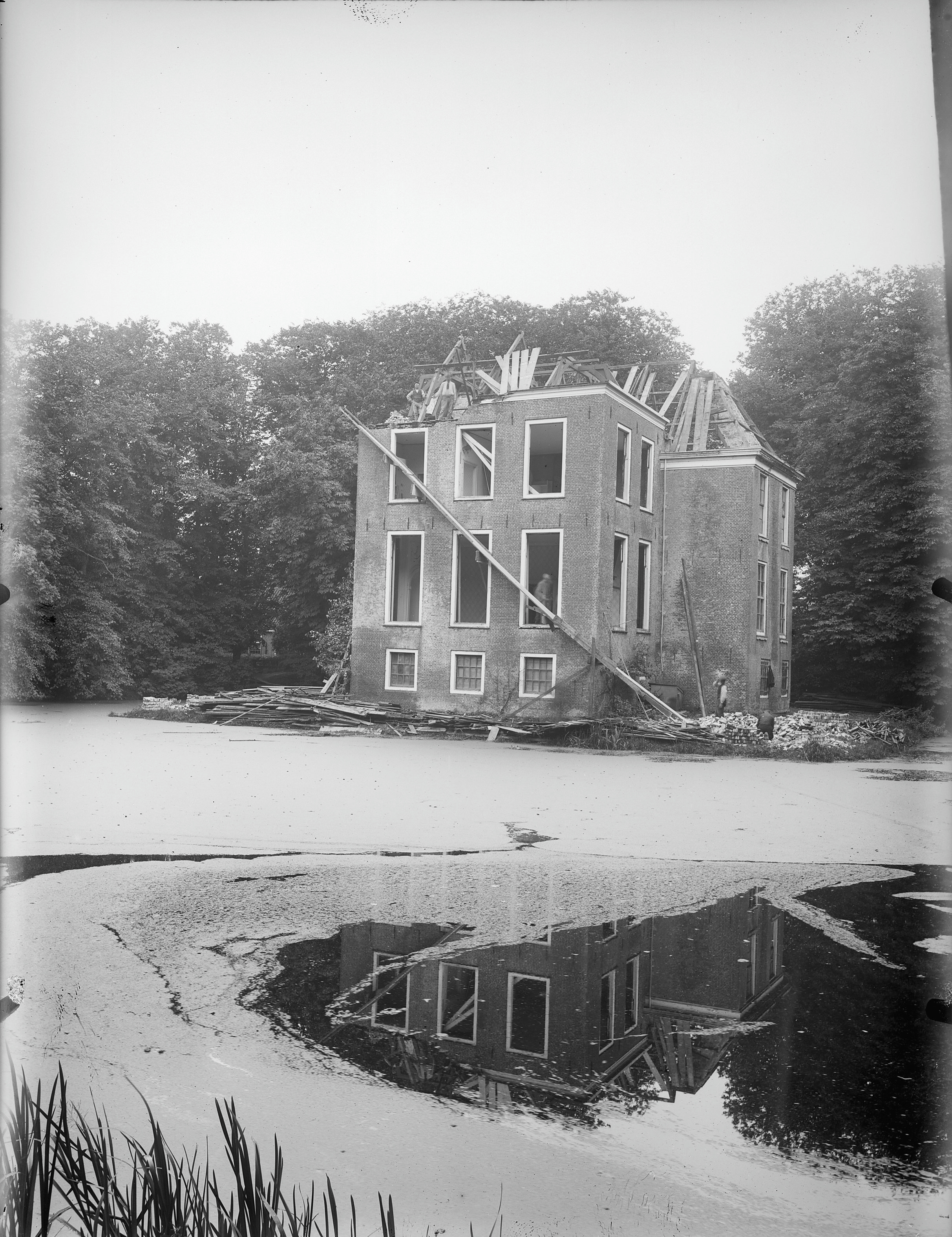 Dekema State: exterieur (opmerking: Fotonummer 6107)